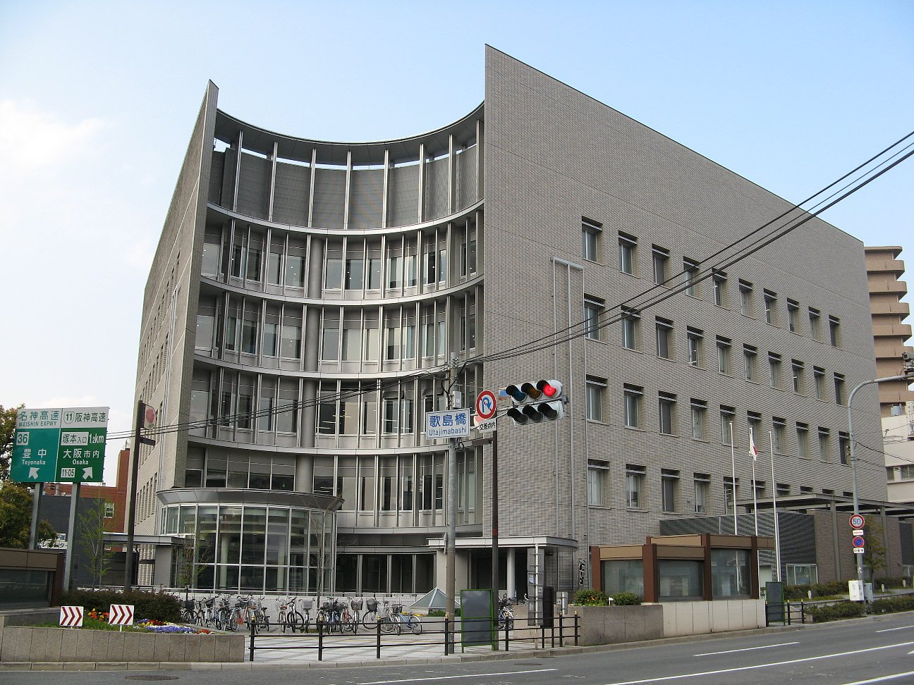 西淀川区役所